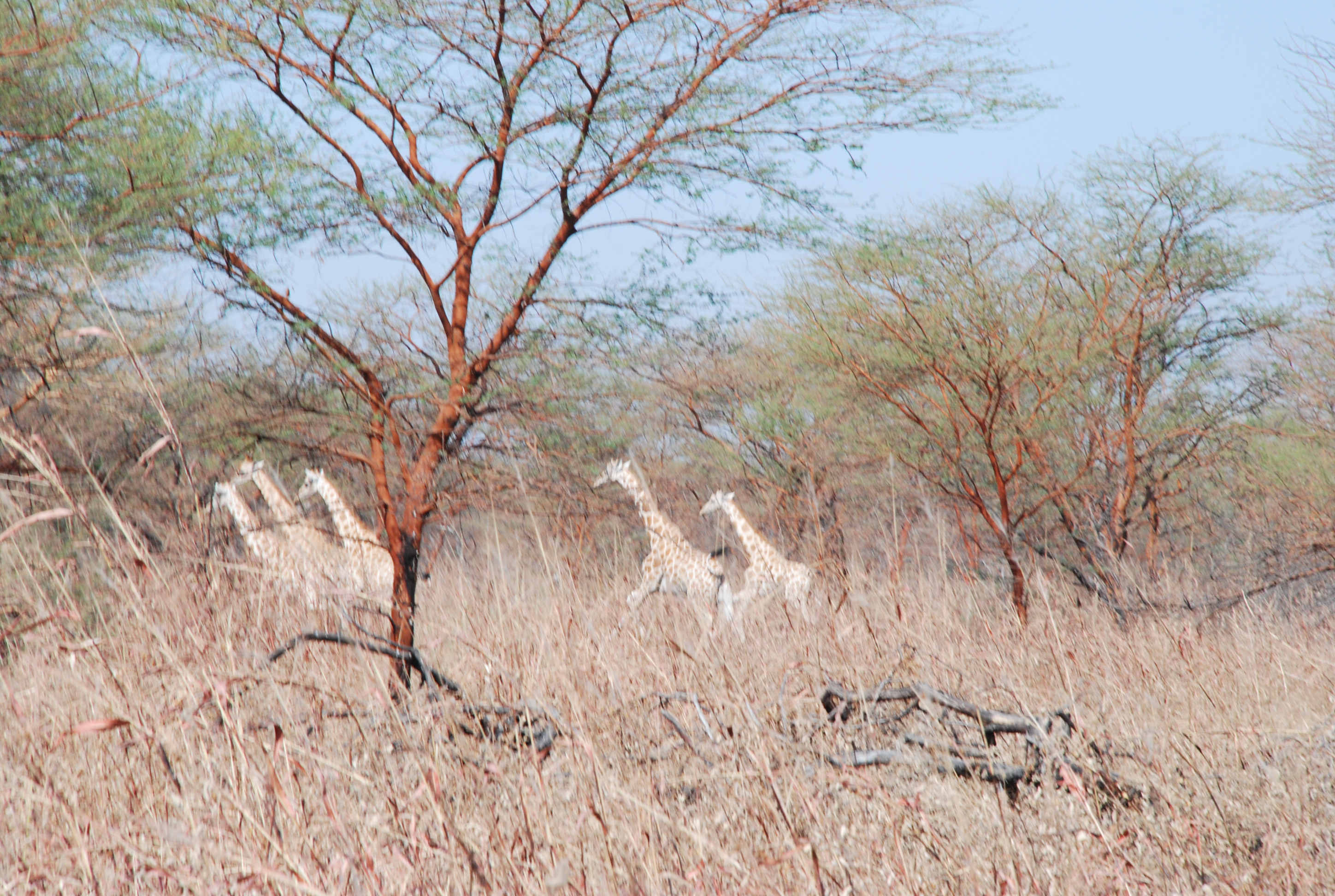 Les girafes dans le parc de Waza, situé dans la région du nord Cameroun